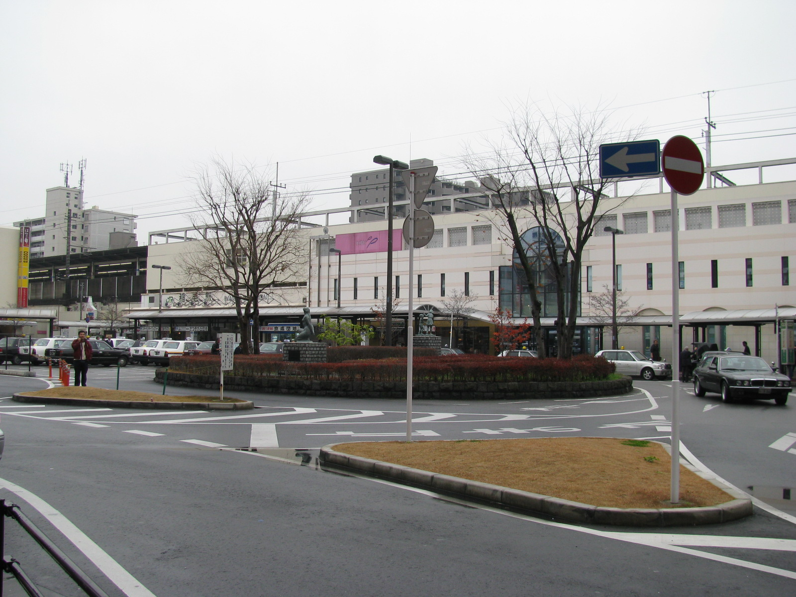 ja：JR稲毛駅東口